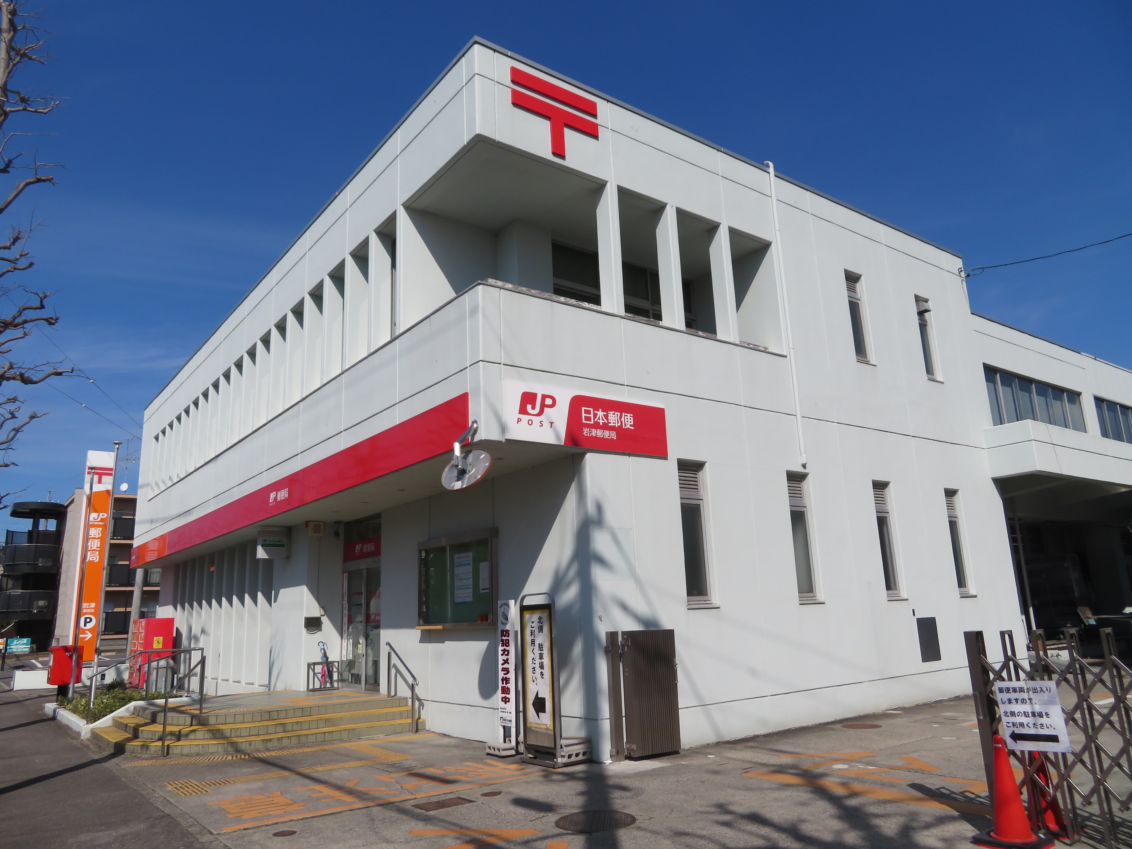 岩津郵便局（岡崎市東蔵前町）